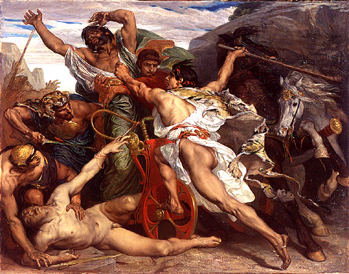 Joseph Blanc, Le meurtre de Laïus par Oedipe, 1867, Paris, Ecole Nationale Supérieure des Beaux-Arts